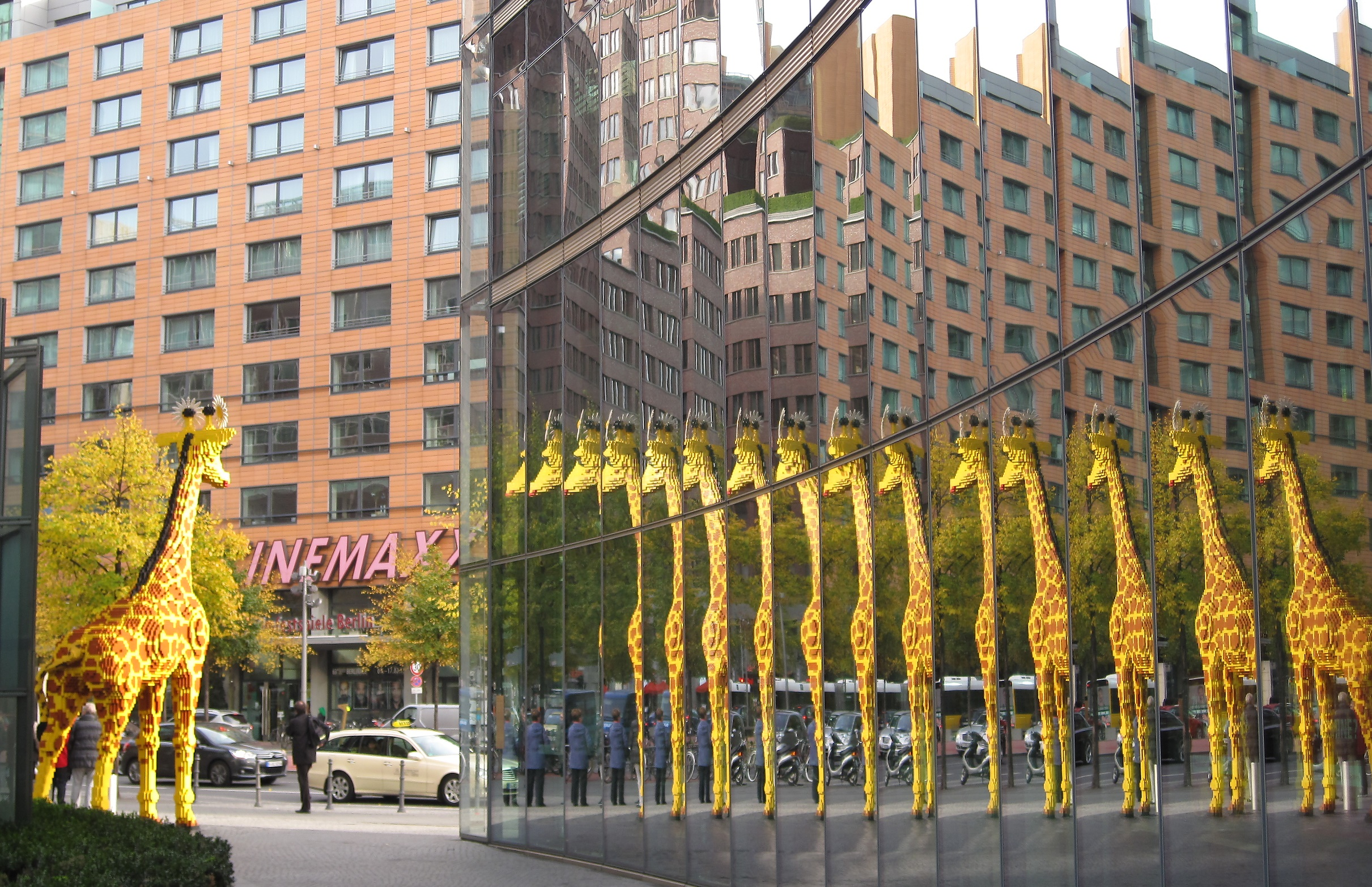 Giraffe aus Legosteinen am Eingang zum Legoland Discovery Centre in Berlin, Potsdamer Platz.